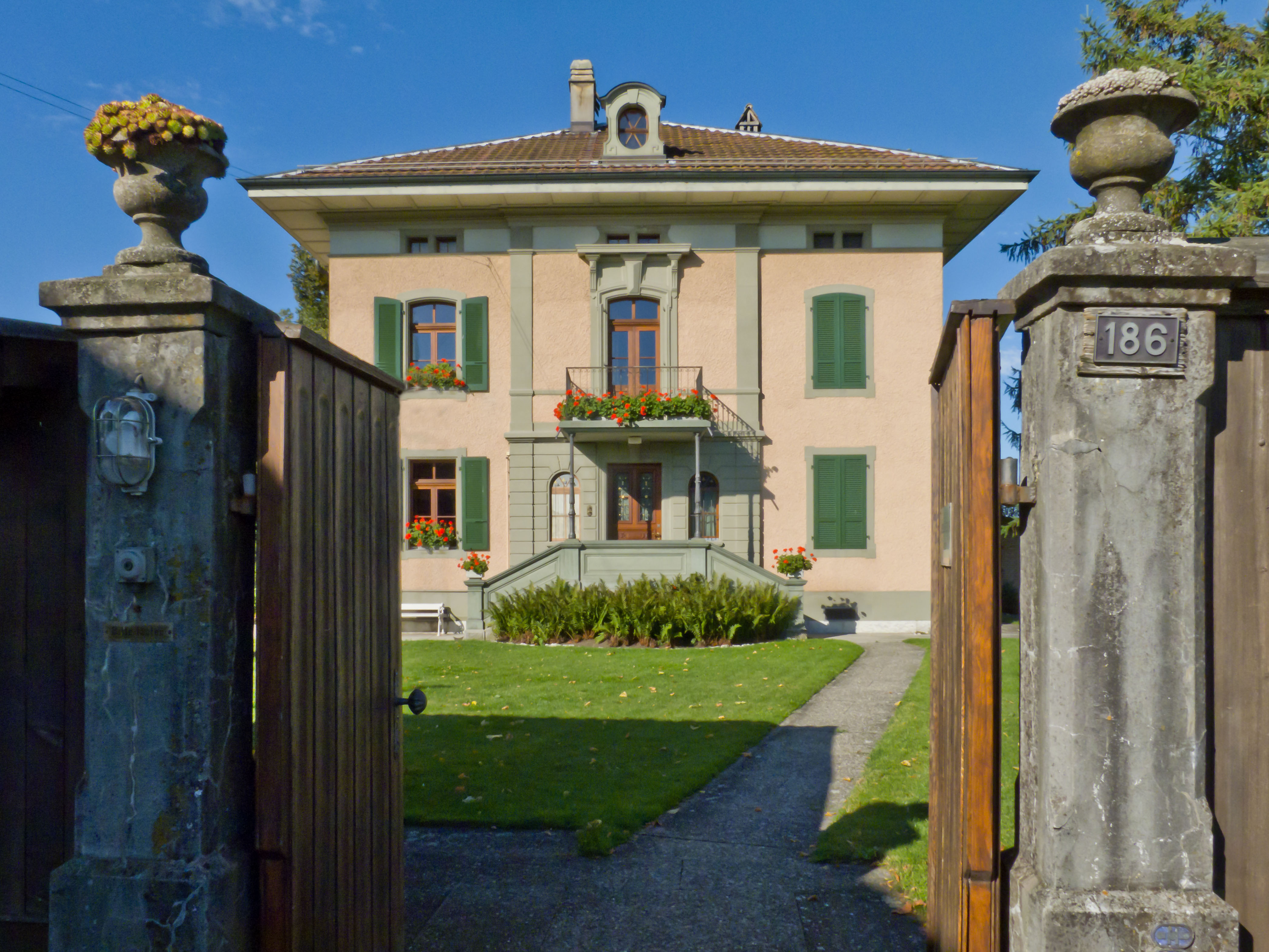 Tor zur Gostelistiftung mit Hauseingang